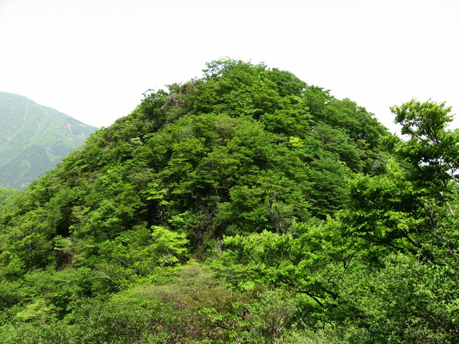 丹沢山地の小笄